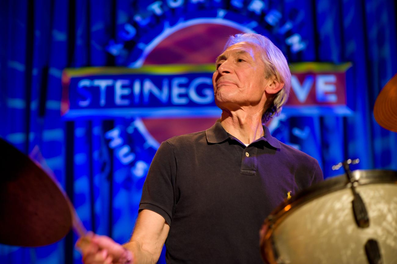 Charly Watt con i suoi ABC&D of Boogie Woogie durante il concerto al Steinegg Live Festival 2010 a Collepietra - Bolzano